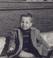 Rino all'età di 2 anni e alle spalle il mare di Crotone